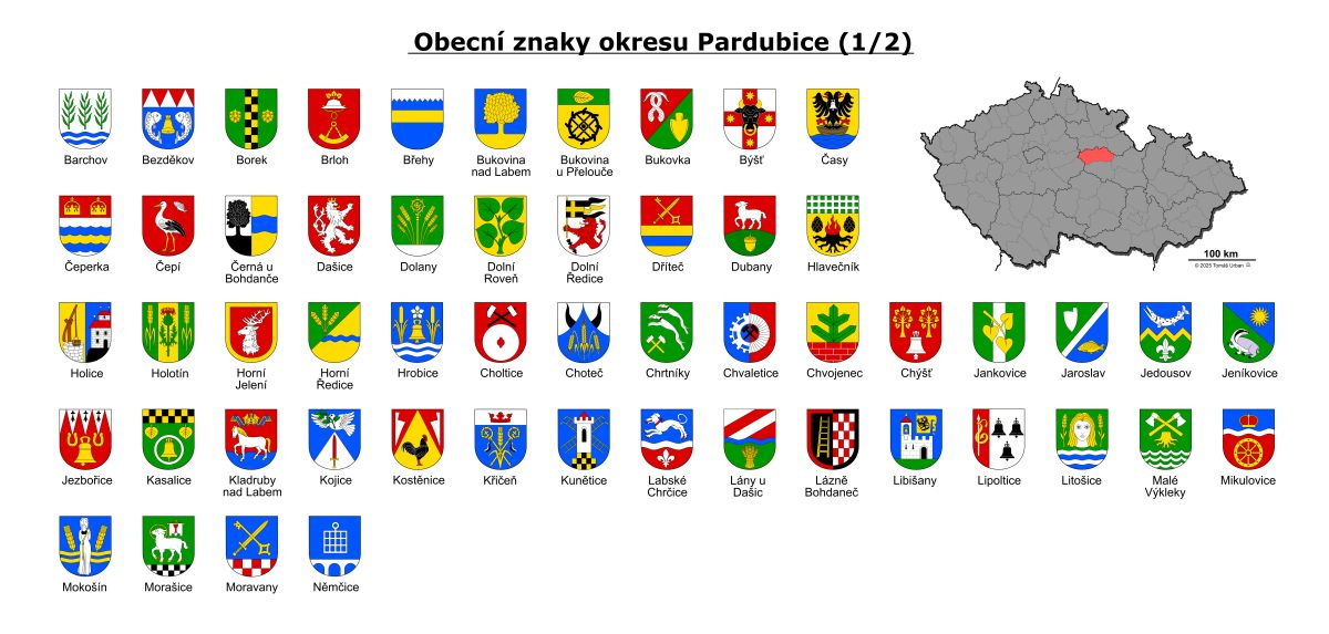 Přehled znaků okresu Pardubice